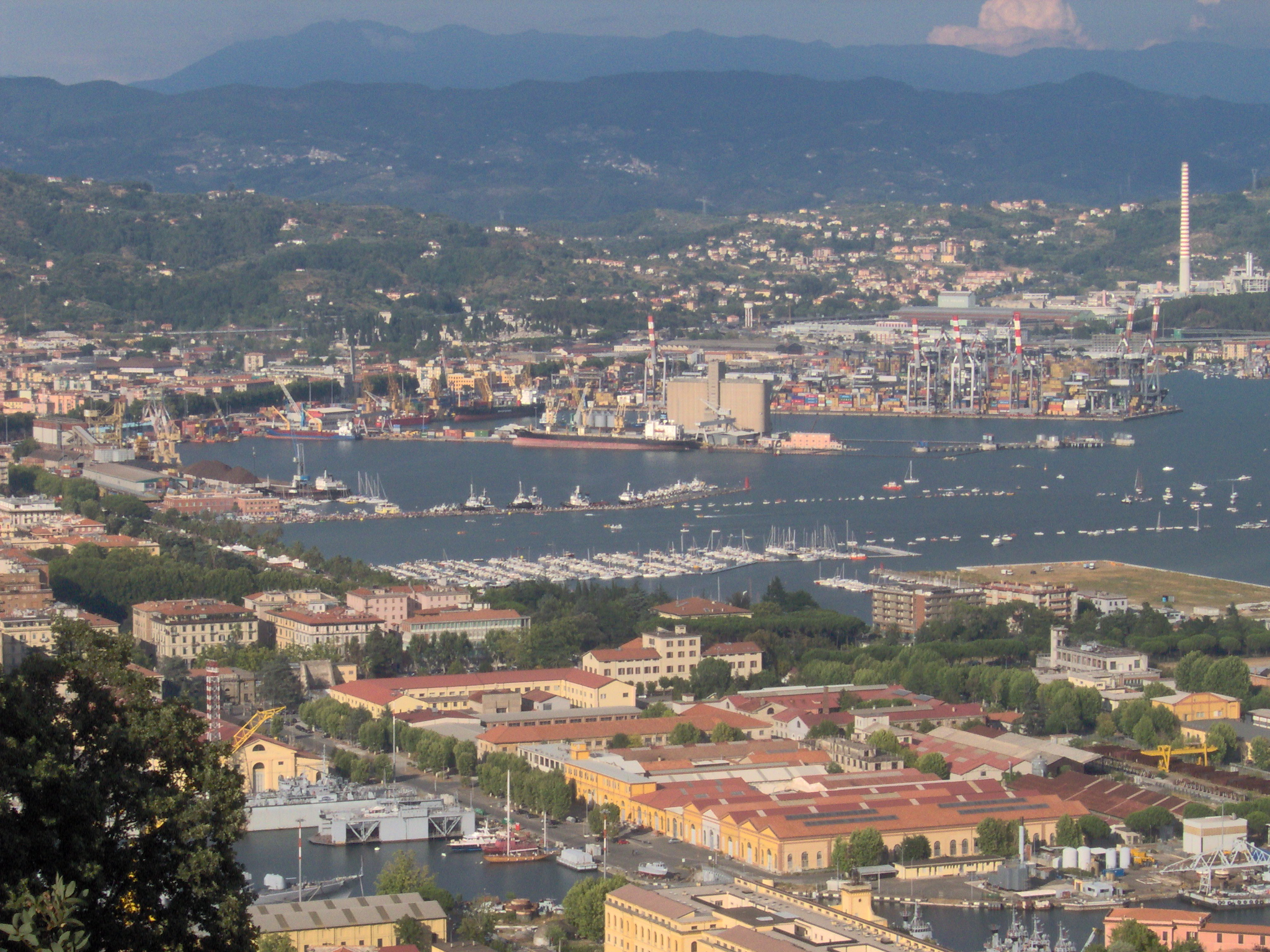 La Spezia - La cattedrale